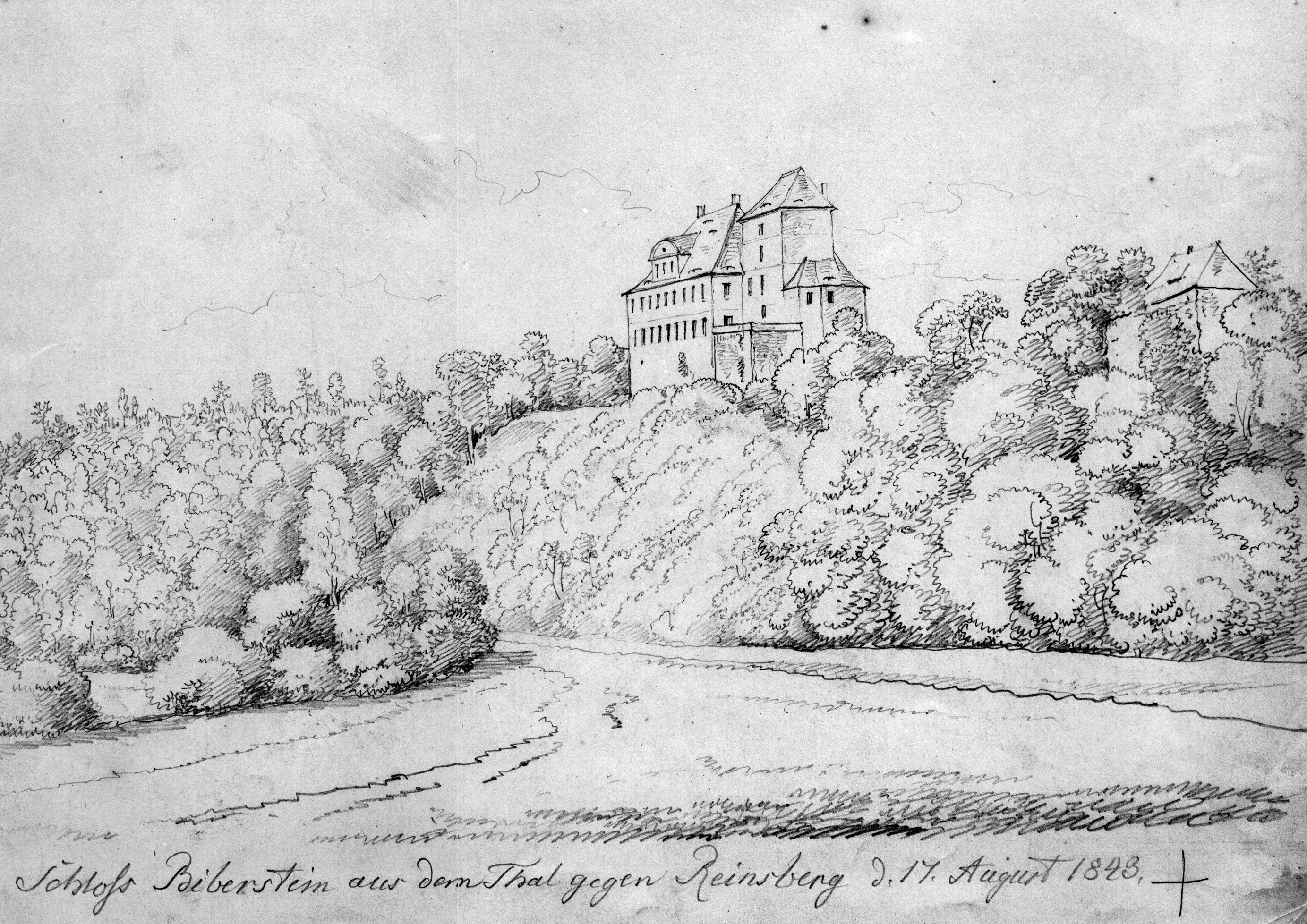 Bleistiftskizze von Burg Bieberstein aus dem Tal gegen Reinsberg